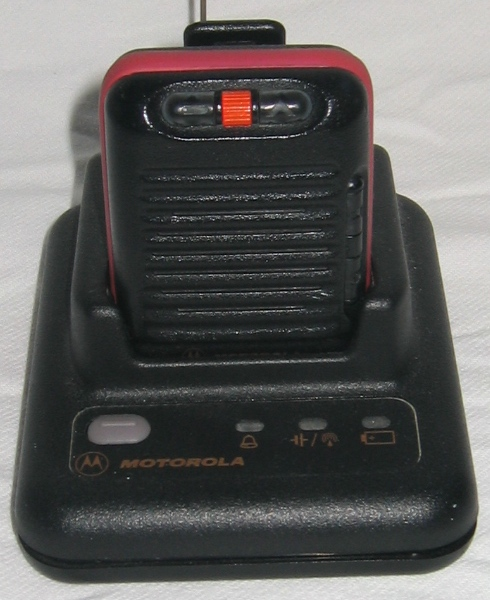 Motorola Firestorm II